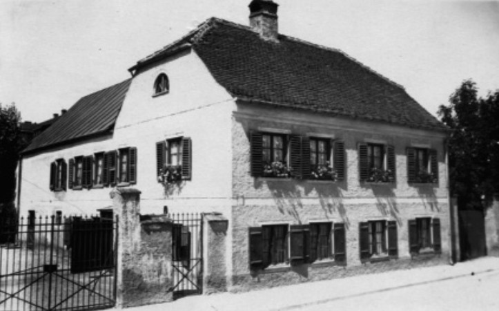 Die Zimmergörglsölde in der Winthirstraße 18, Neuhausen, im Jahr 1905.